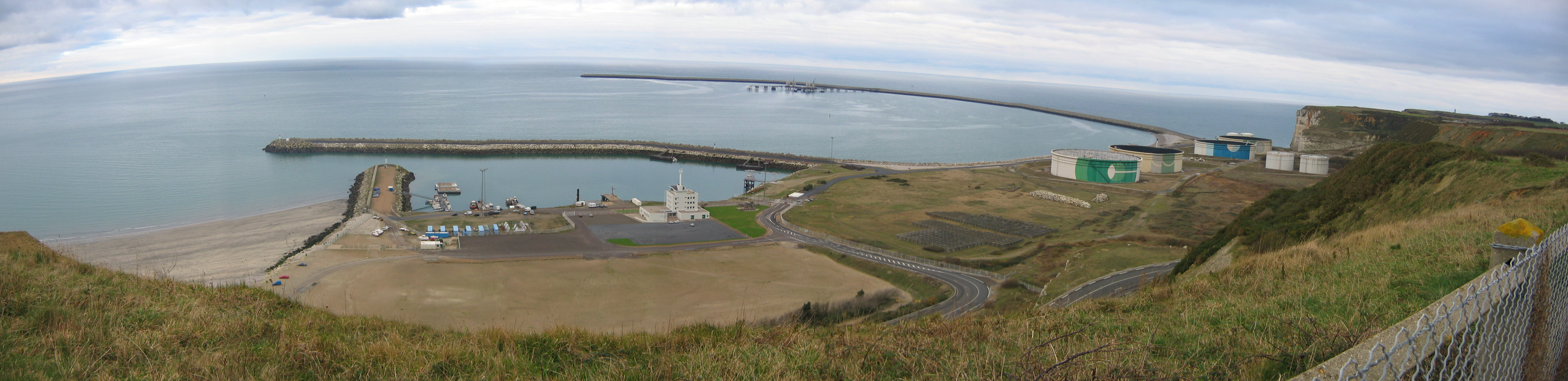 Photographie panoramique du port pétrolier d'Antifer, Seine-Maritime. Photographie personnelle prise en décembre 2004 par l'utilisateur Urban / GFDL Urban